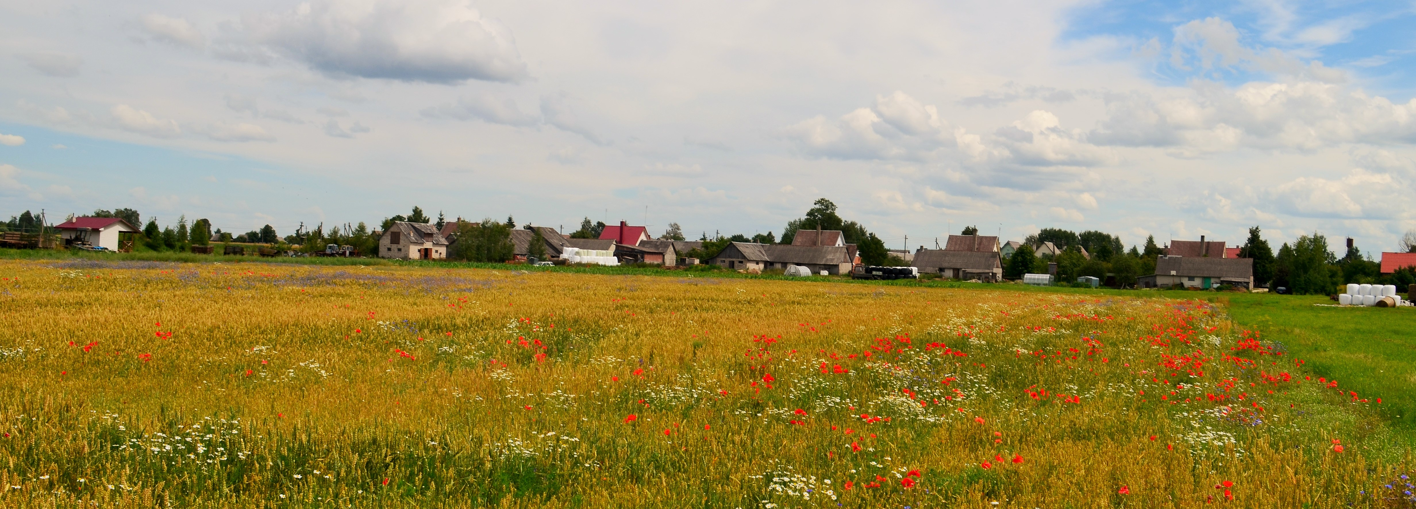 Petronys, Ukmergės raj.